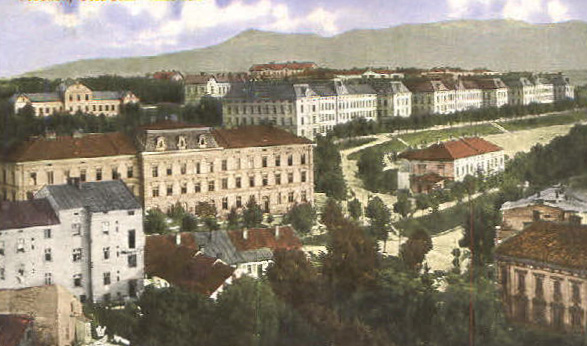 Kaserne in Teschen